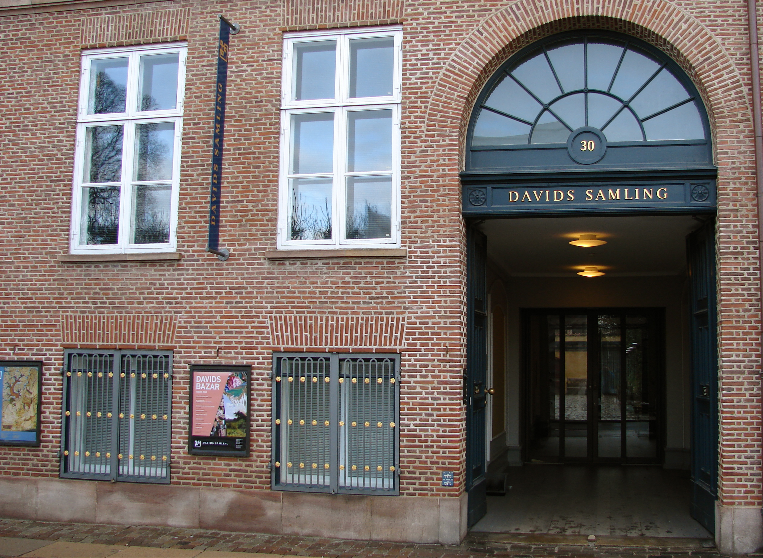 Davids Samling, København